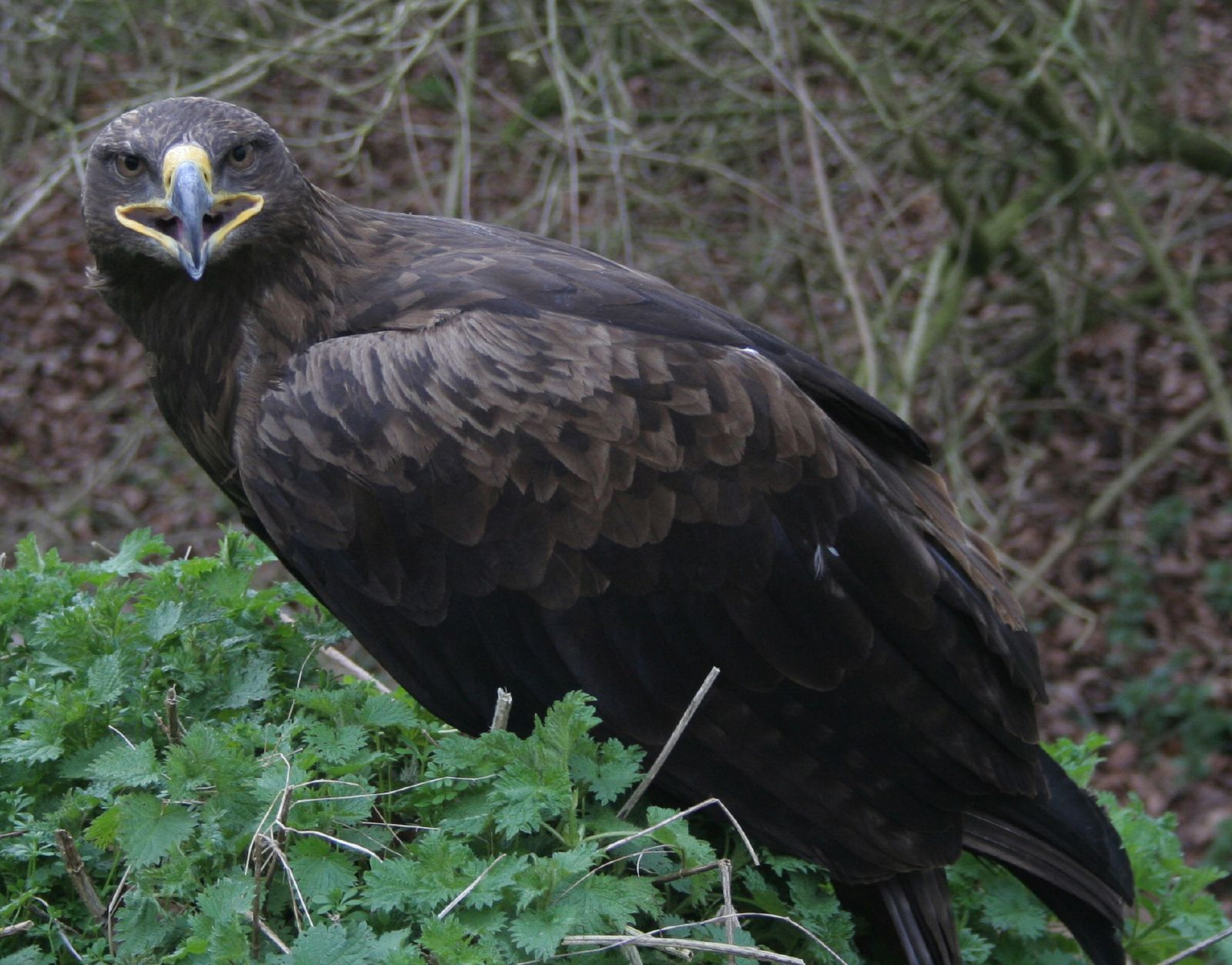 Aquila nipalensis russian steppe eagle